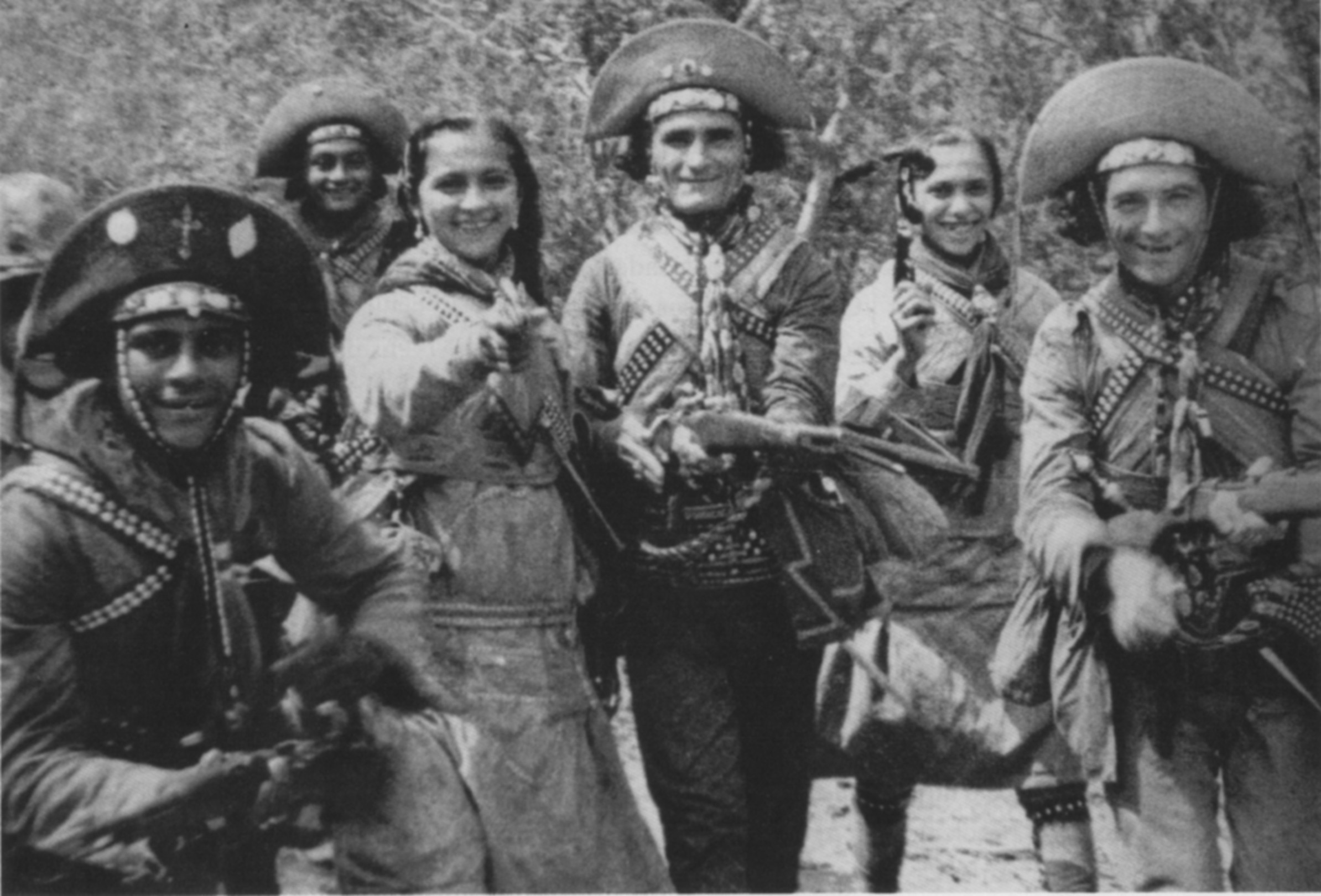 Retratos do cangaço: Virgínio Fortunato